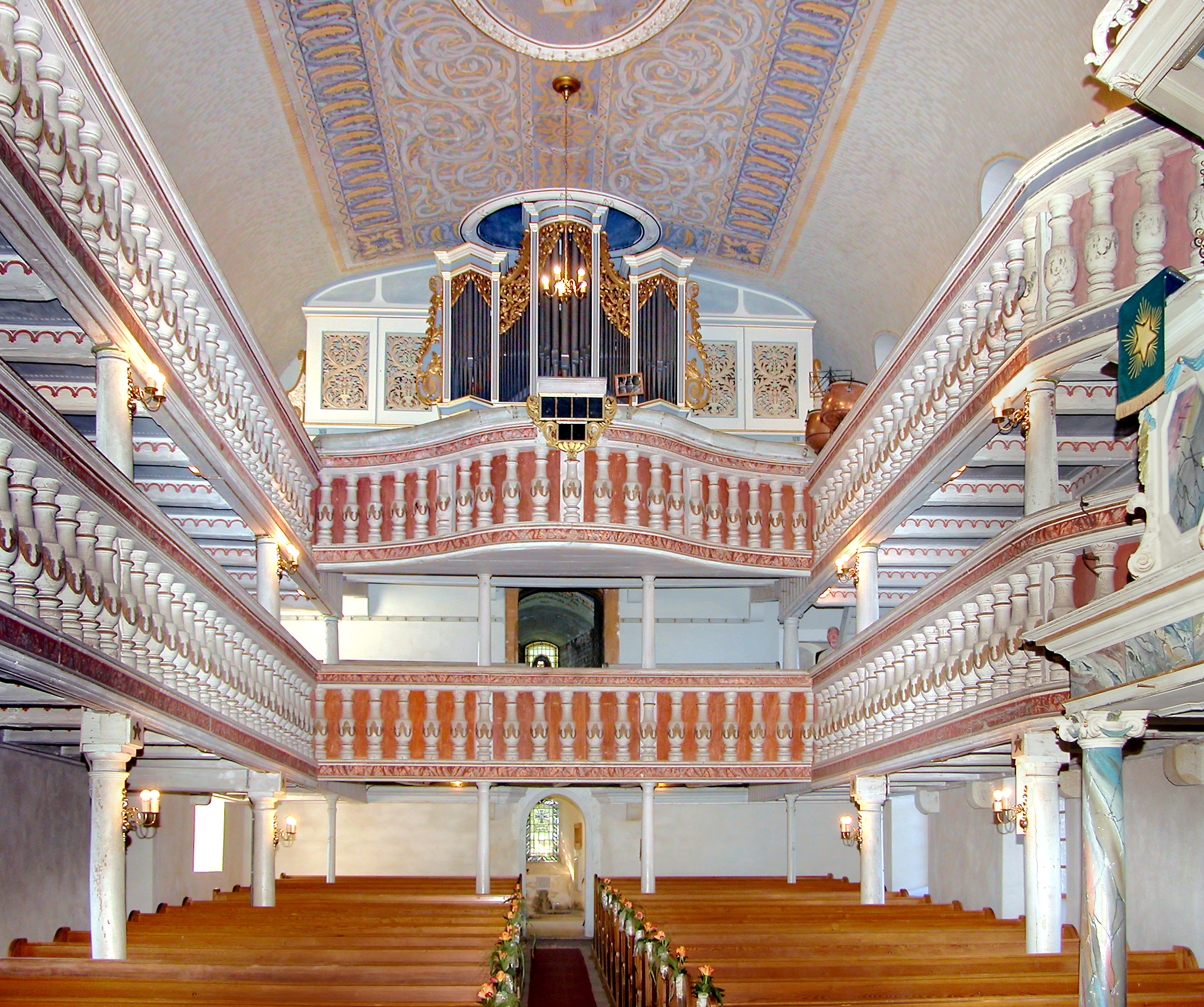 12.09.2011 09627 Oberbobritzsch (Bobritzsch-Hilbersdorf): Dorfkirche St. Nicolaus, Kirchstraße (GMP: 50.875369,13.453209). Erstmals 1392 erwähnt. Im Kern mittelalterlich, 1710 erneuert. Blick zur ursprünglich 1-manualigen Silbermann-Orgel von 1716 (die aber leider radikal verändert worden ist, so dass nur noch Weniges an Silbermann erinnert). Emporenmalerei von 1711. Jugendstilmalerei an der Decke. [DSCNn2753.TIF]201109122355DR.JPG(c)Blobelt